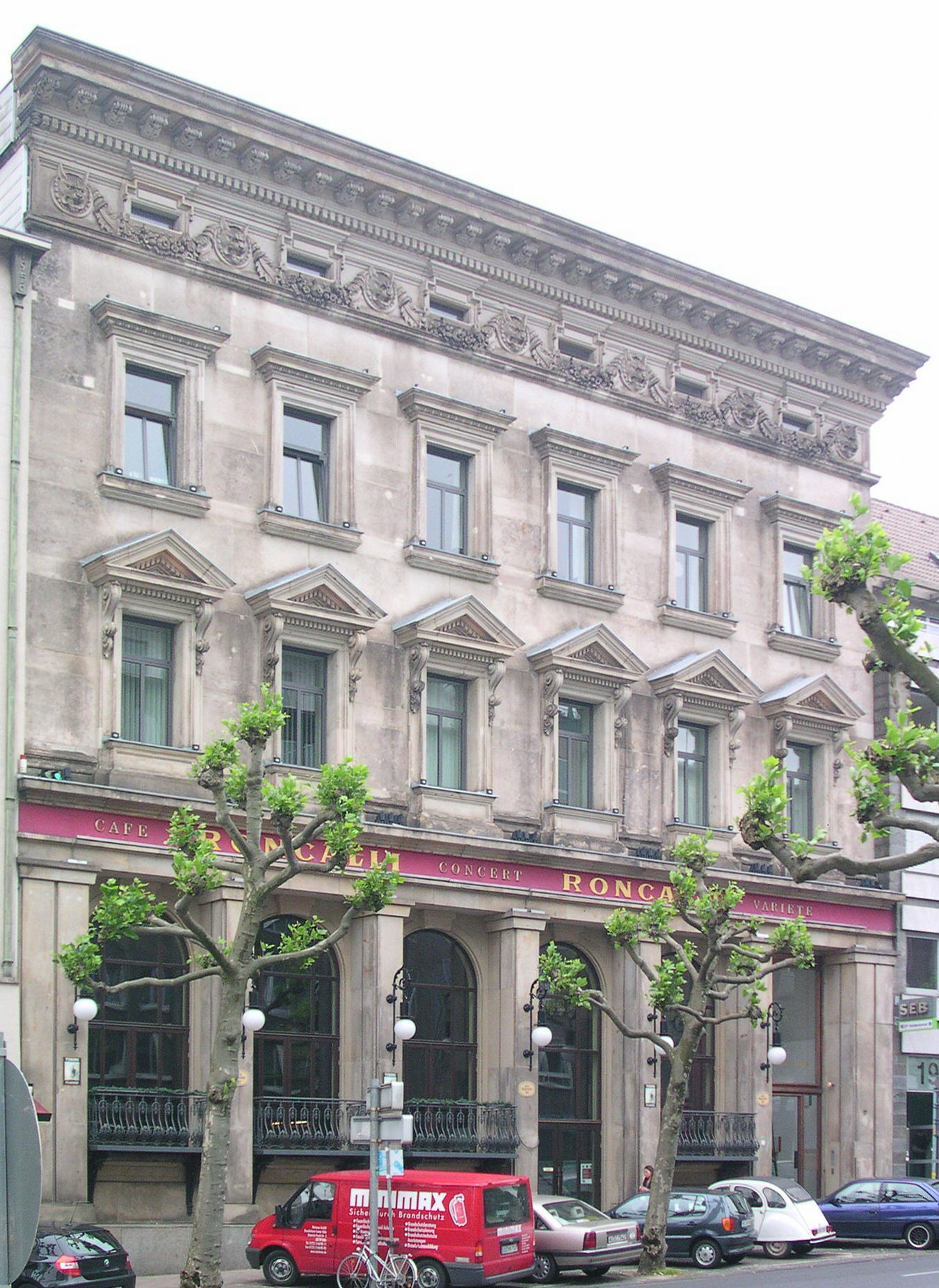 Aachen, ehemaliges Gebäude der Landeszentralbank in der Theaterstraße